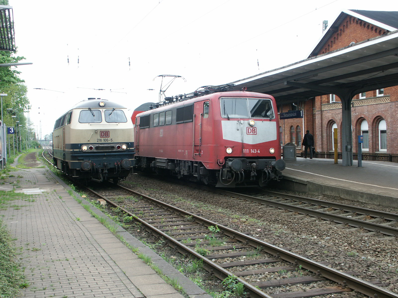 Baureihe 216 und 111 by Niederkasseler